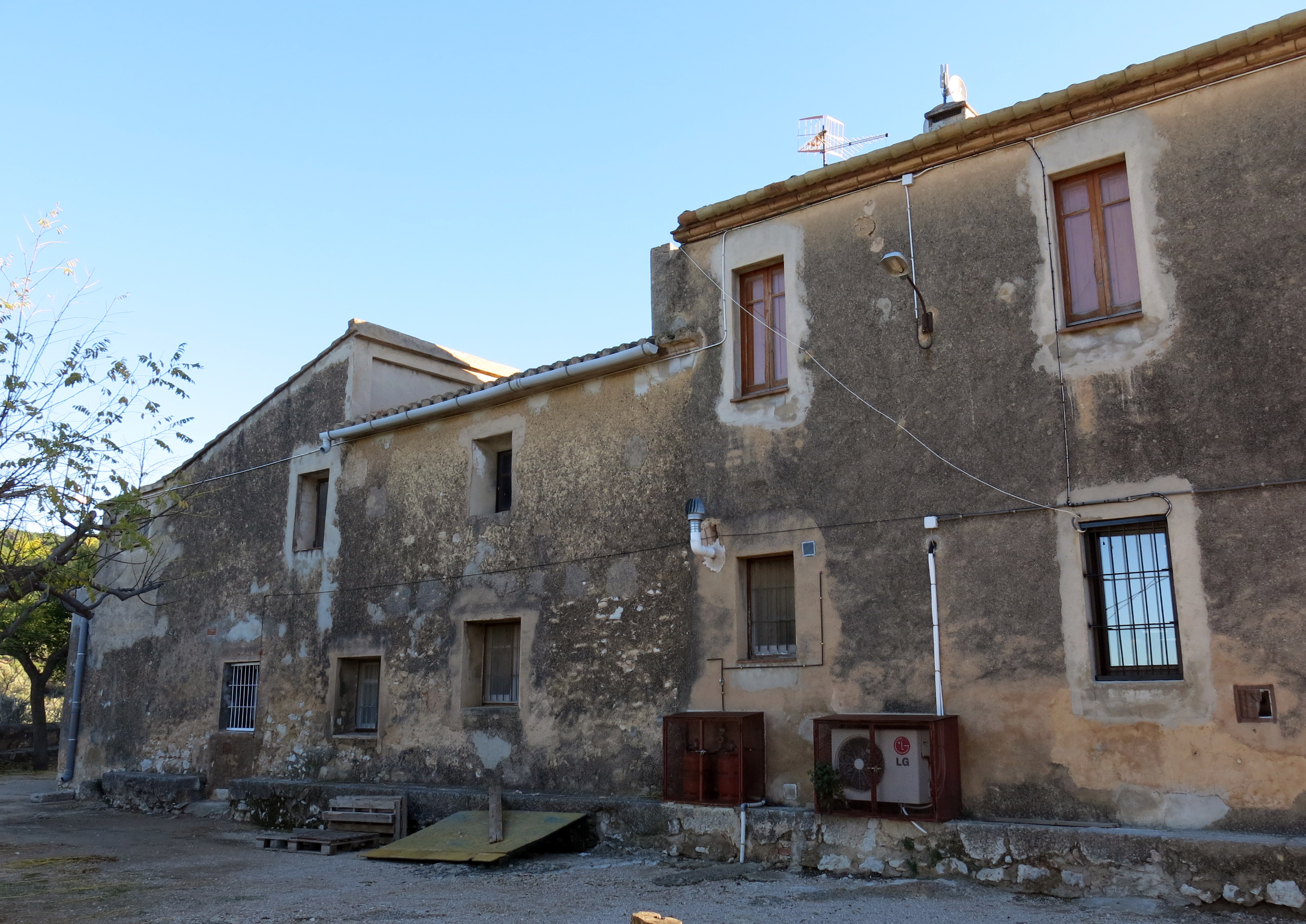 Ermita de Mig Camí (Tortosa)